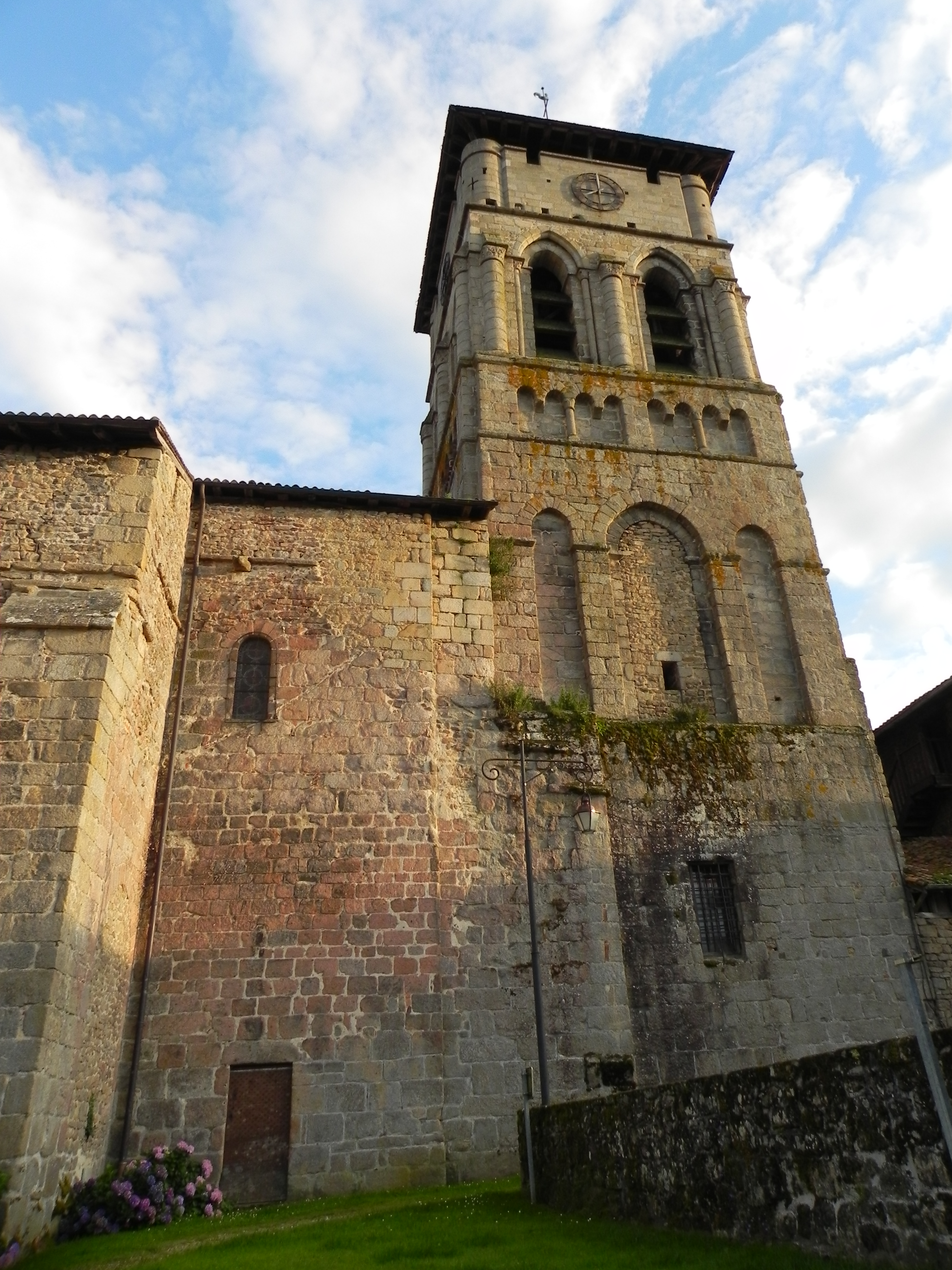 Eymoutiers, Haute-Vienne, Limousin, France